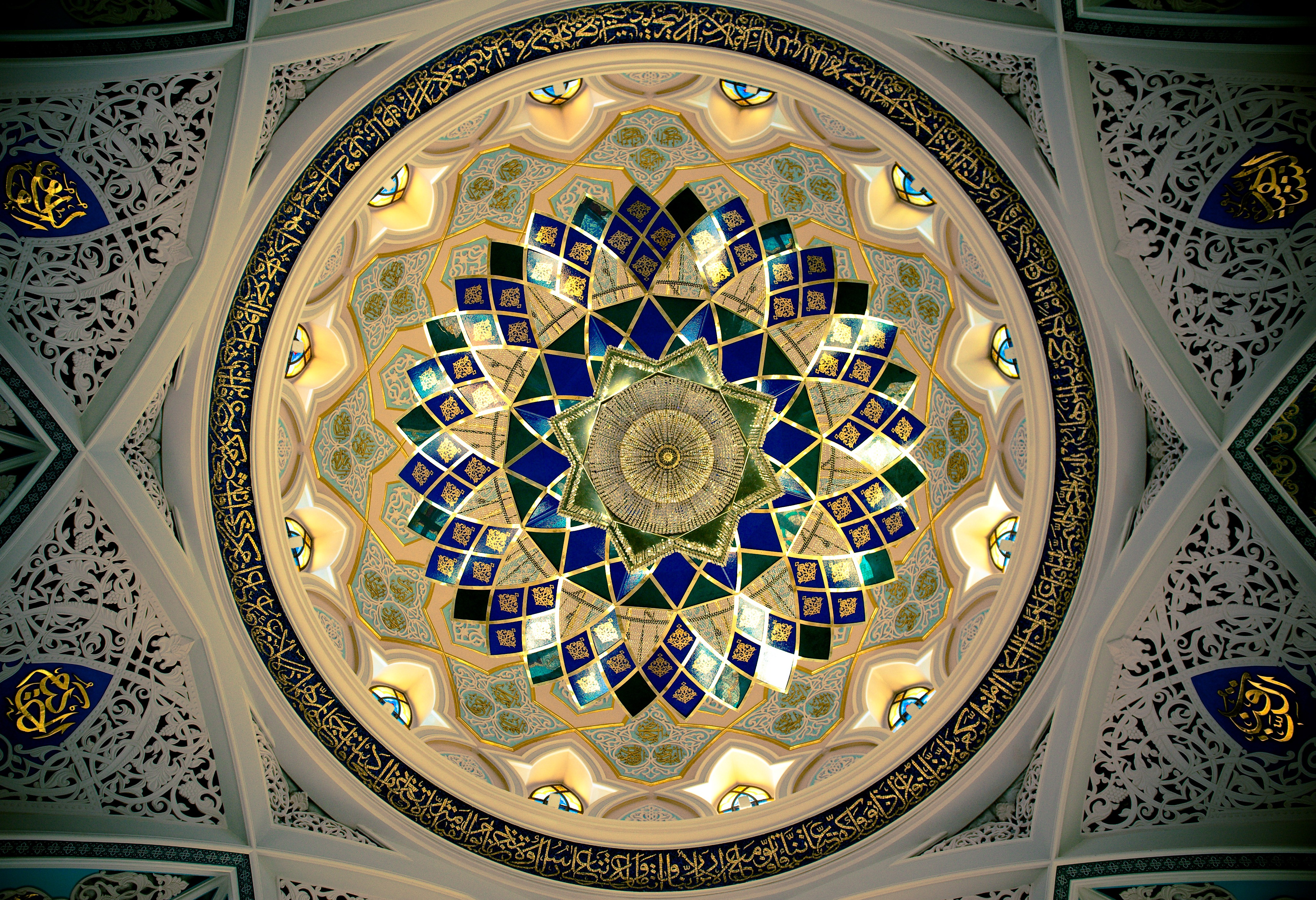 Kul Sharif Mosque